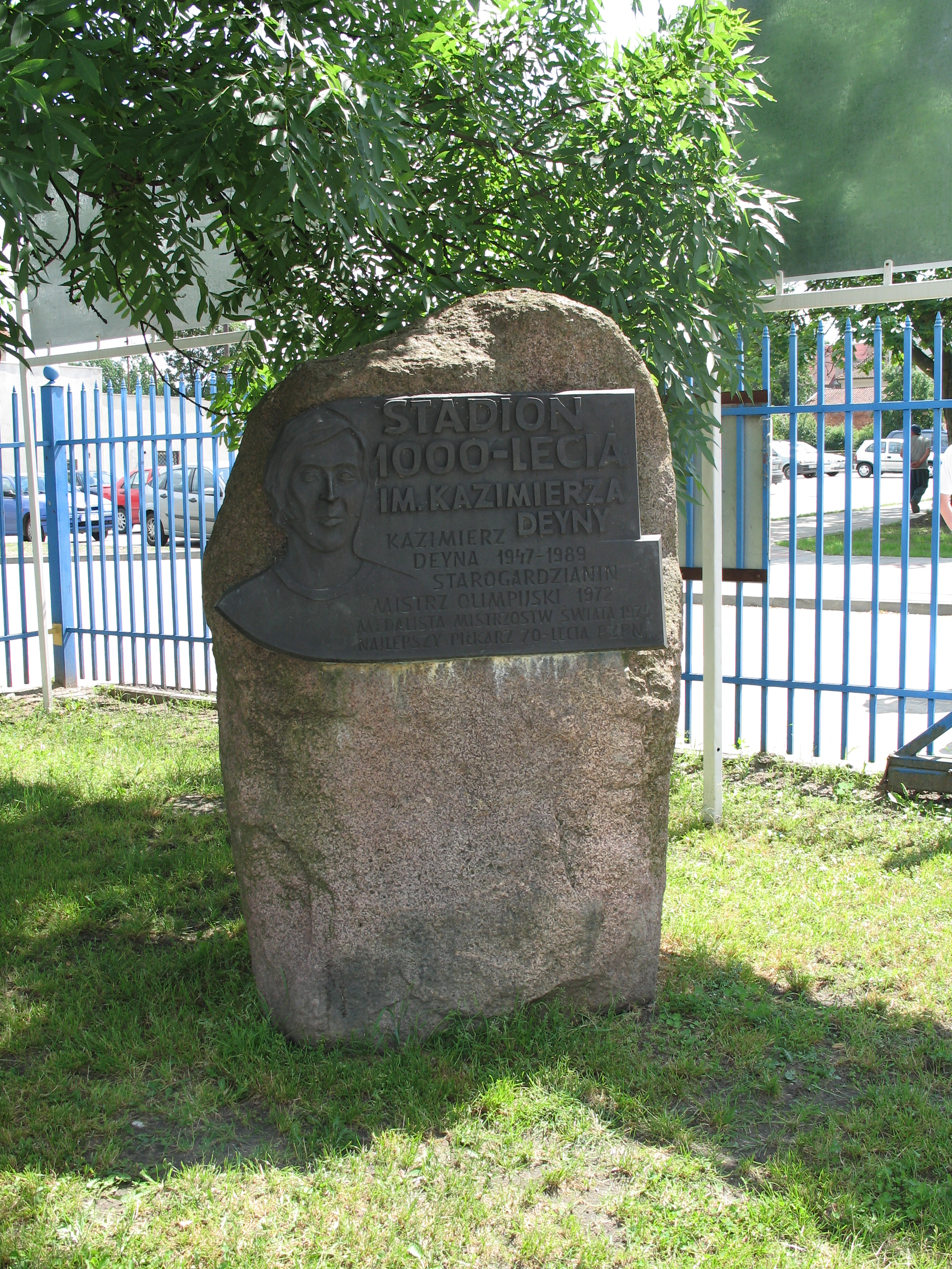 Starogard Gdański. Pamiątkowy obelisk upamiętniający Kazimierza Deynę ustawiony przy wejściu na stadion jego imienia.